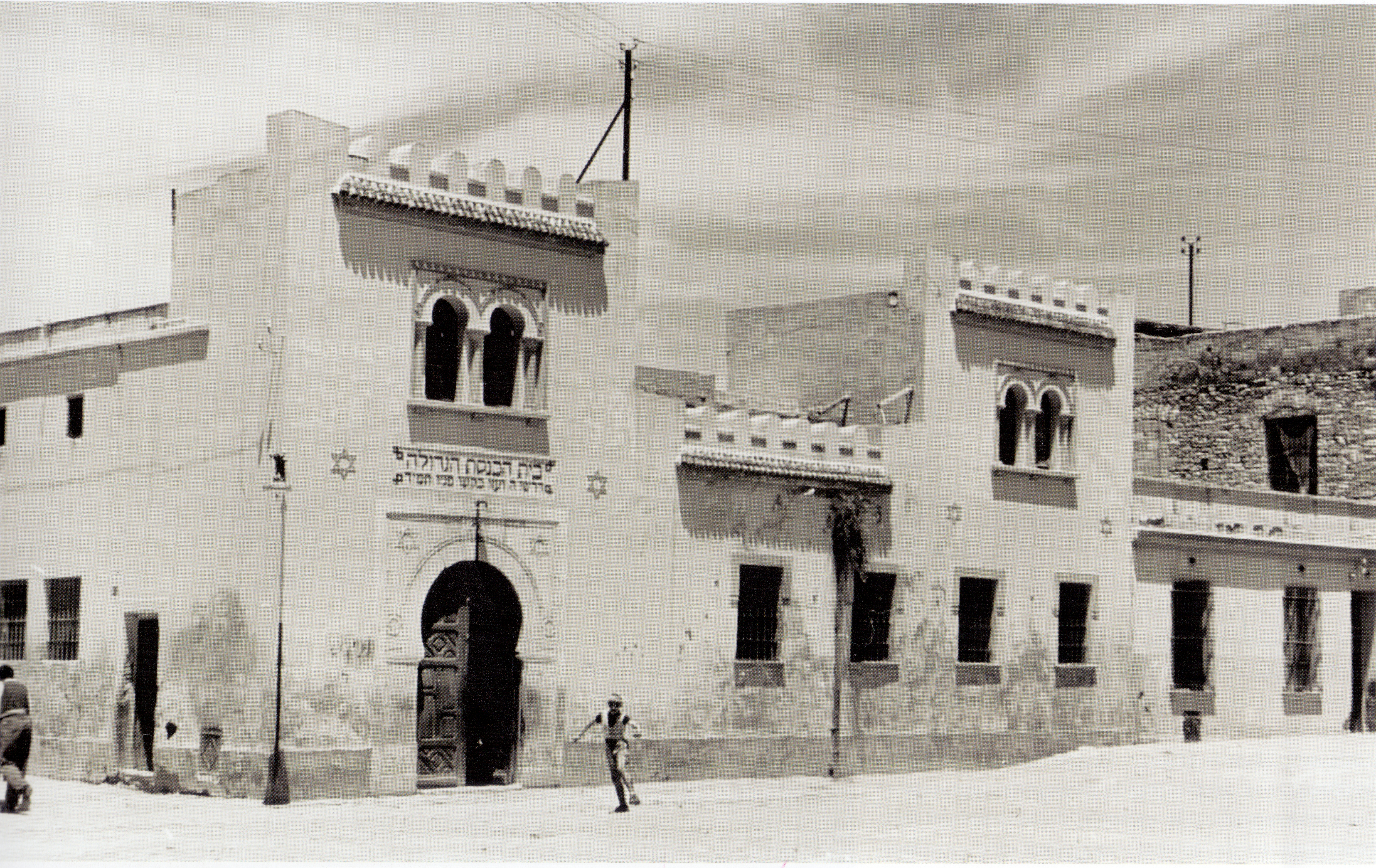 Grande Synagogue de la Hara de Tunis